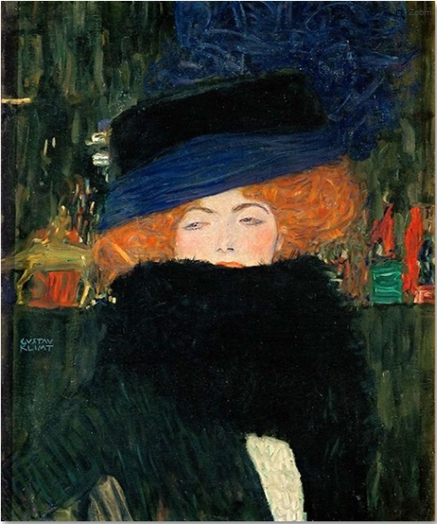 Dame mit Hut und Federboa